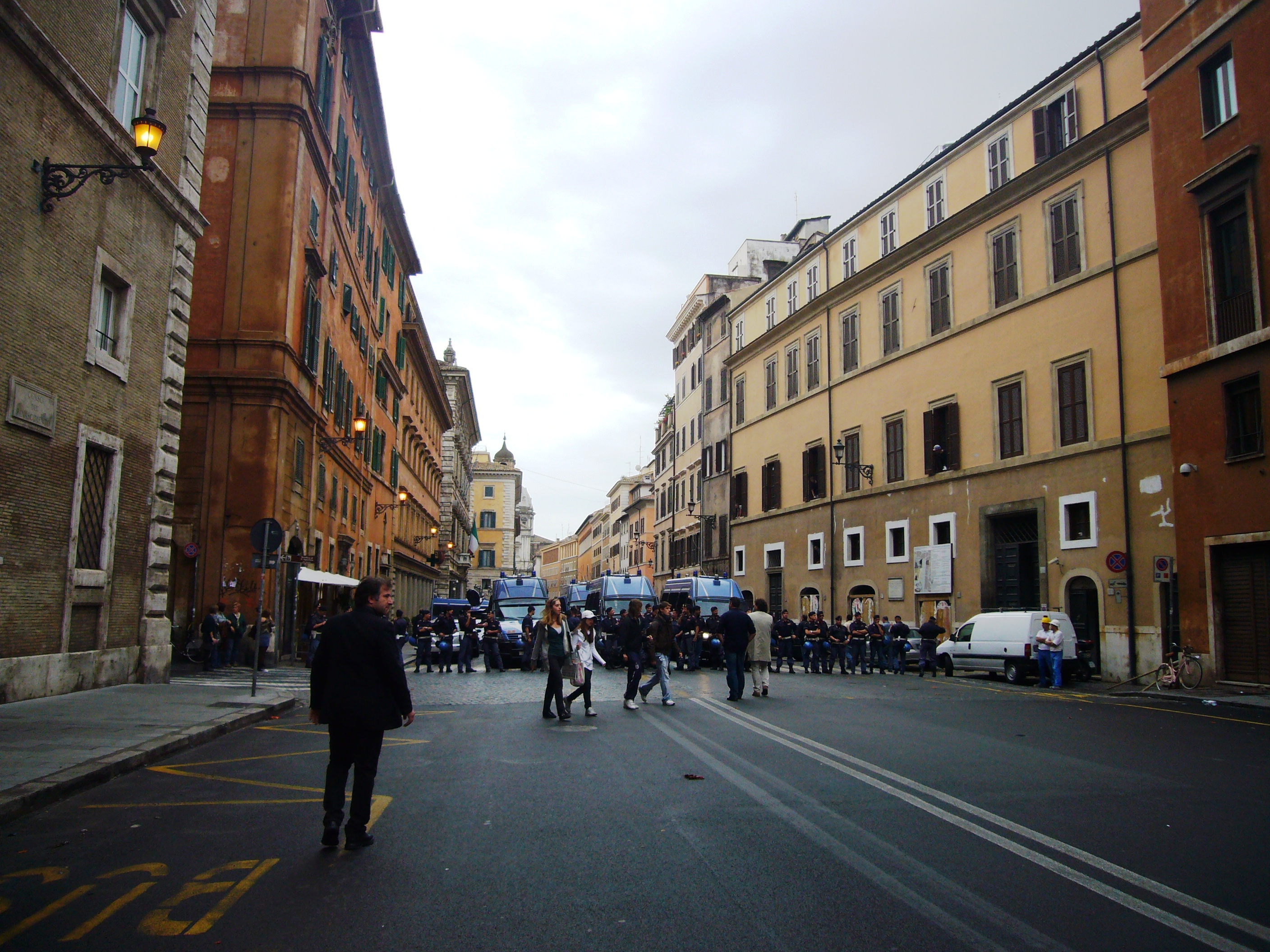 Roma, corso Rinascimento con polizia schierata per una manifestazione studentesca